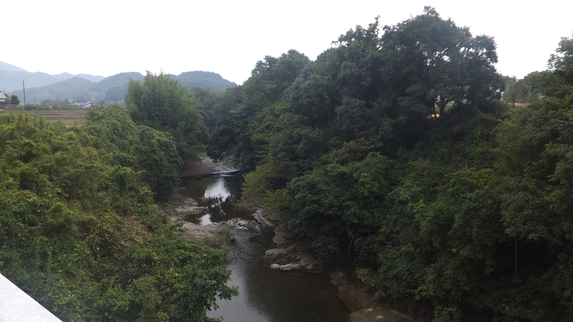 兵庫県三木市志染町戸田 淡河川